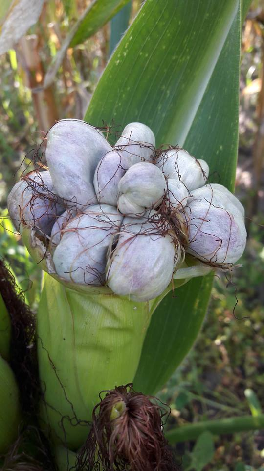 kolba kukurydzy porażona przez głownię kukurydzy